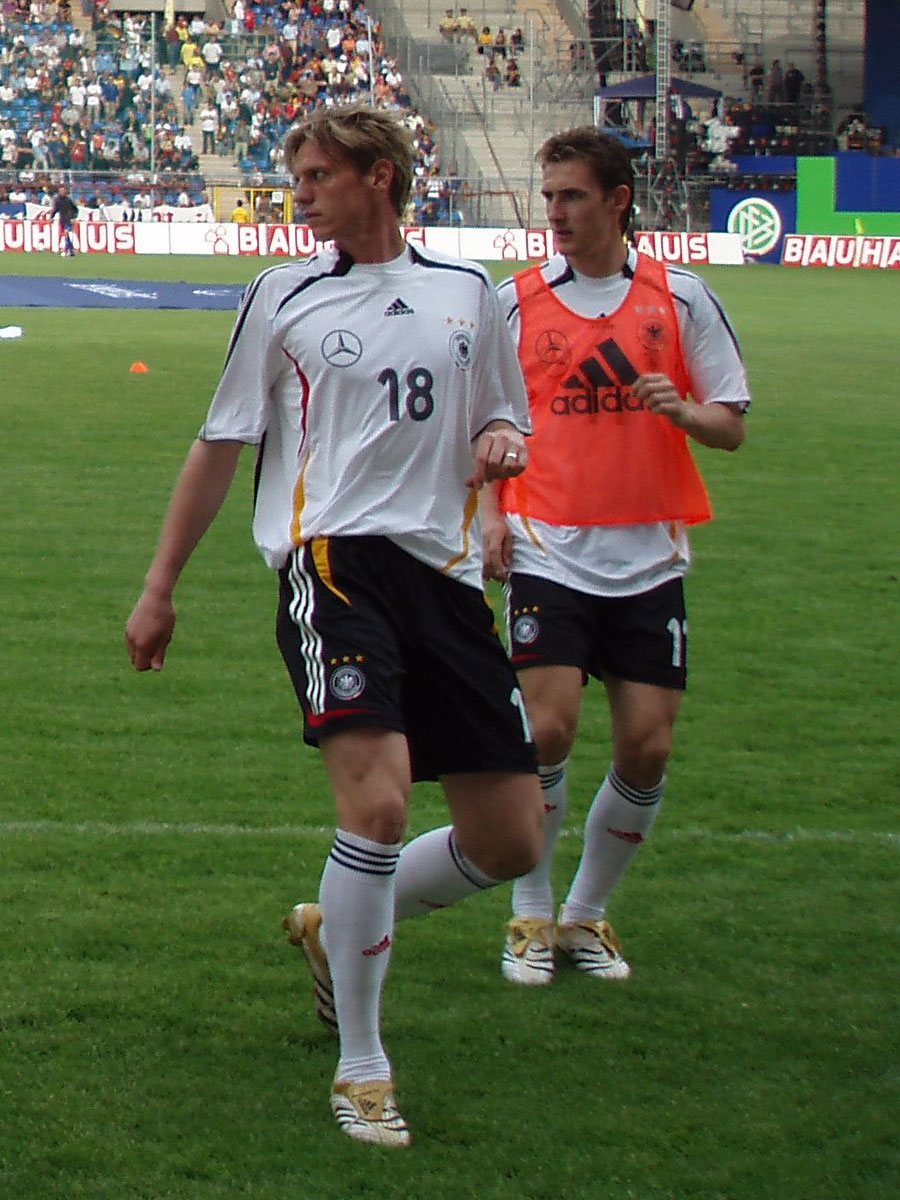 Tim Borowski und Miroslav Klose, Testspiel der deutschen Nationalmannschaft gegen den Verbandsligisten FSV Luckenwalde, 16. Mai 2006.